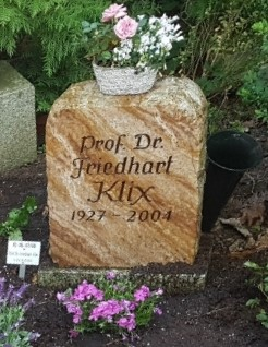 Grabstein Friedhart Klix